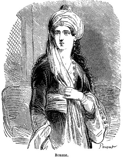 Illustration par Pauquet de la tragédie Bajazet de Racine, dans le Panthéon populaire illustré, 2e série, 1851